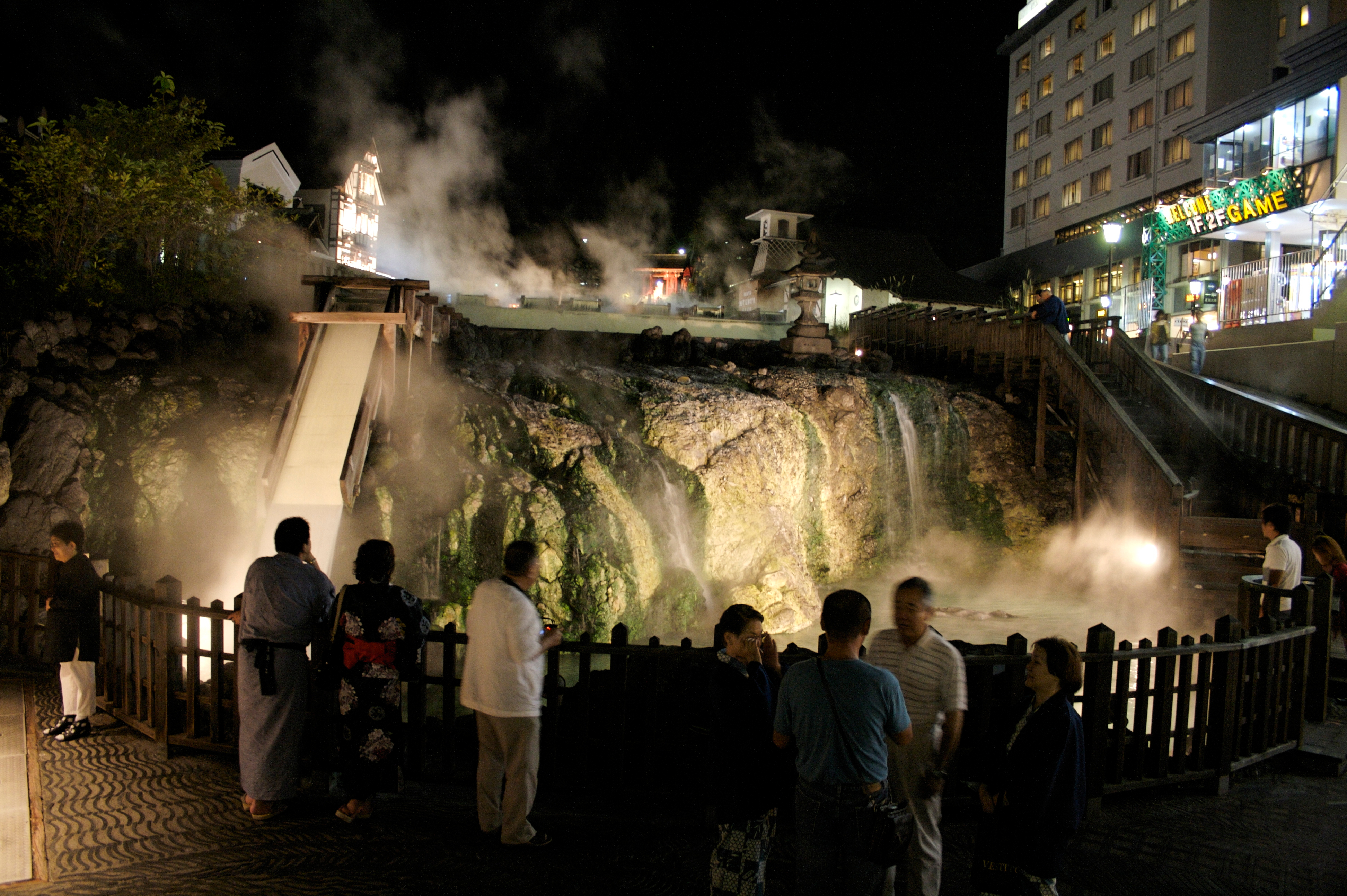 Yubatake at night in Kusatsu Onsen, Gunma Prefecture, Japan.